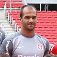 Visita da presidente Dilma Rousseff ao Beira-Rio (20 de fevereiro de 2014